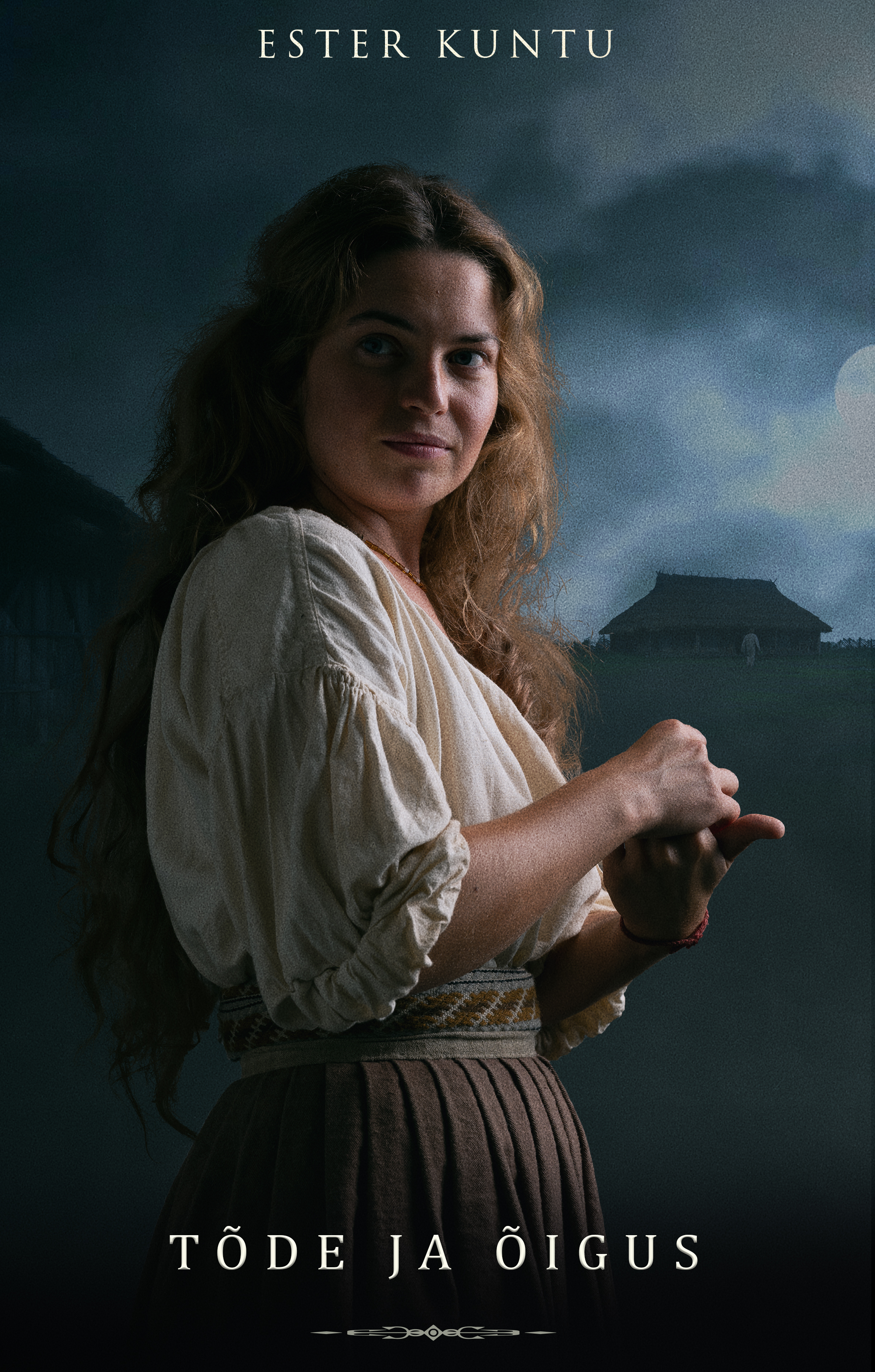 Ester Kuntu filmis "Tõde ja õigus" Mari osatäitjana